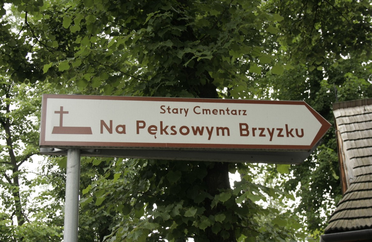 stary cmentarz (Na Pęksowym Brzyzku) wraz z murem, bramą, drzewami i pomnikami